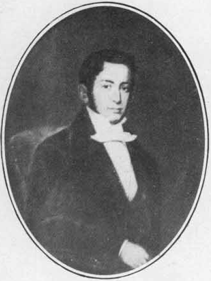 Ambrosio Aldunate Carvajal; político chileno de tendencias conservadoras. Nació el 22 de agosto de 1794. Hijo de Francisco Martínez de Aldunate y la señora Francisca Mauricia de Carvajal y González. Casado con Rosa Carrera Fontecilla. Sus estudios los realizó en la Universidad de San Marcos de Lima. Miembro la Asamblea provincial de Santiago (1831). Vicepresidente de la Asamblea en marzo de 1831 y presidente de la misma en mayo. Firmante de la Constitución de 1833. Elegido Diputado por Talca (1834-1837). Integró la Comisión de Guerra y Marina. Reelegido para el periodo de 1843-1846. Militaba en el peluconismo y conservantismo. Falleció en Lima el 17 de marzo de 1844.